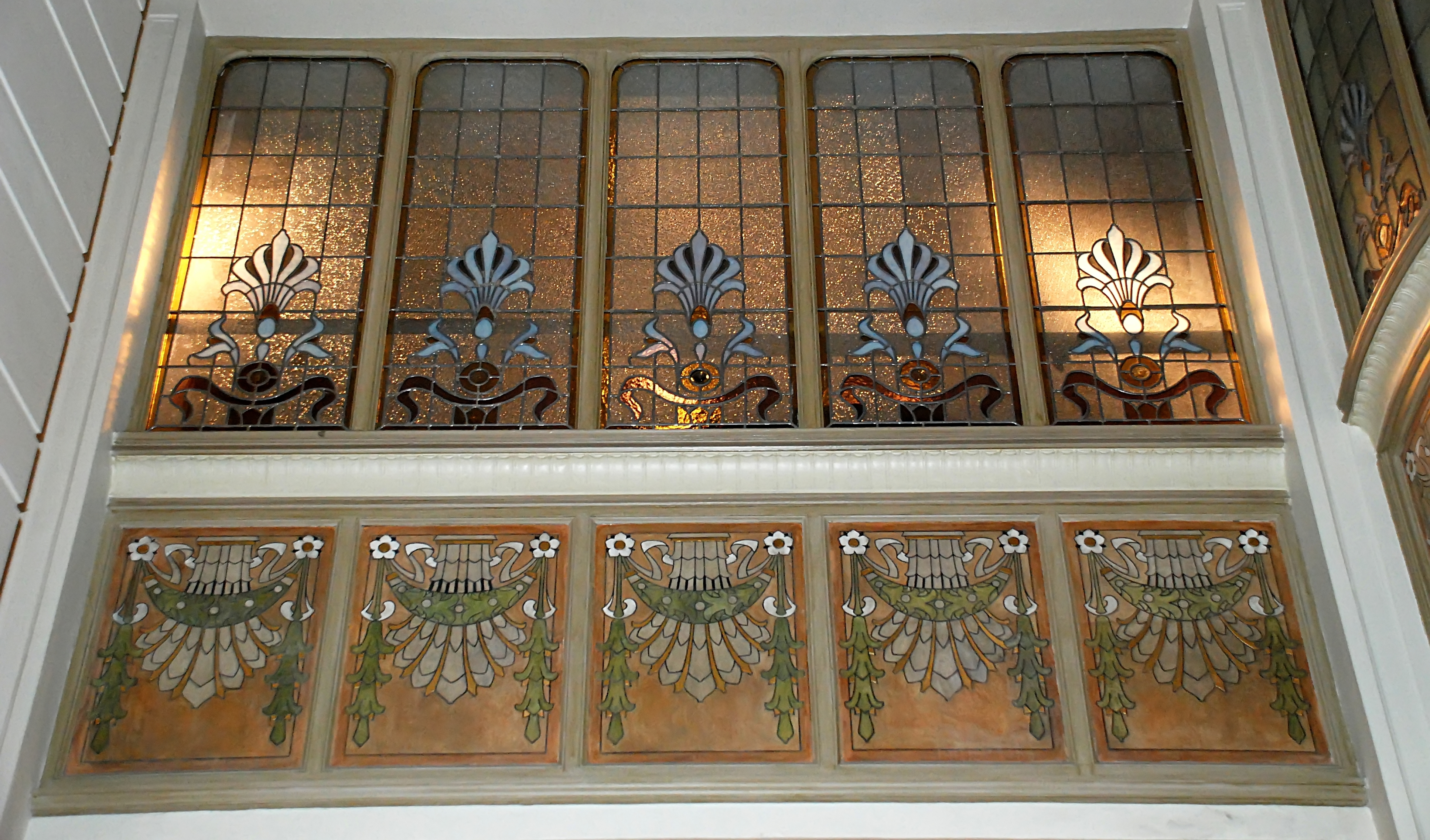 Léon Govaerts - Siège de la Gresham Life Assurance Society Limited, Place Royale à Bruxelles (Art nouveau; 1903)